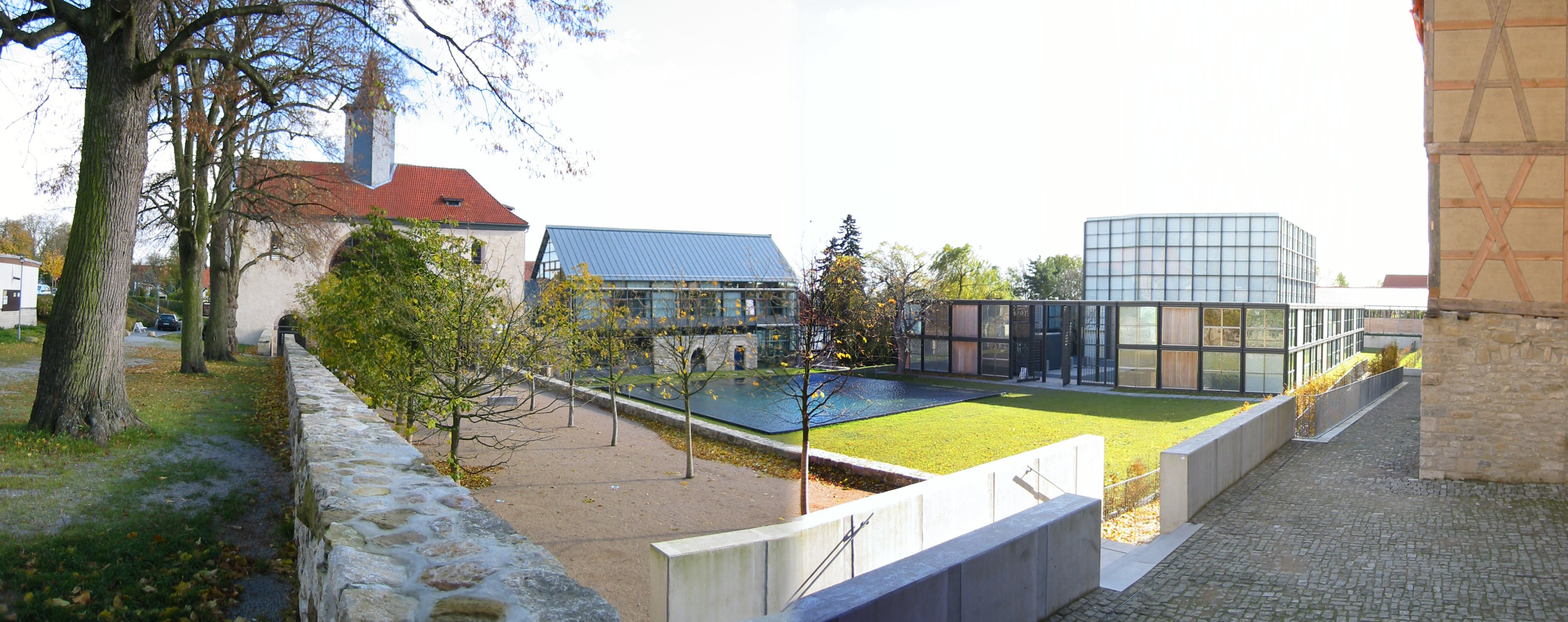 Übersicht Kloster Volkenroda